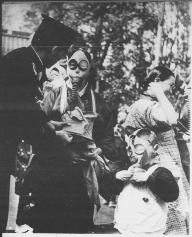 ガスマスクの付け方を市民に指導する警察官。1938年（昭和13年）。